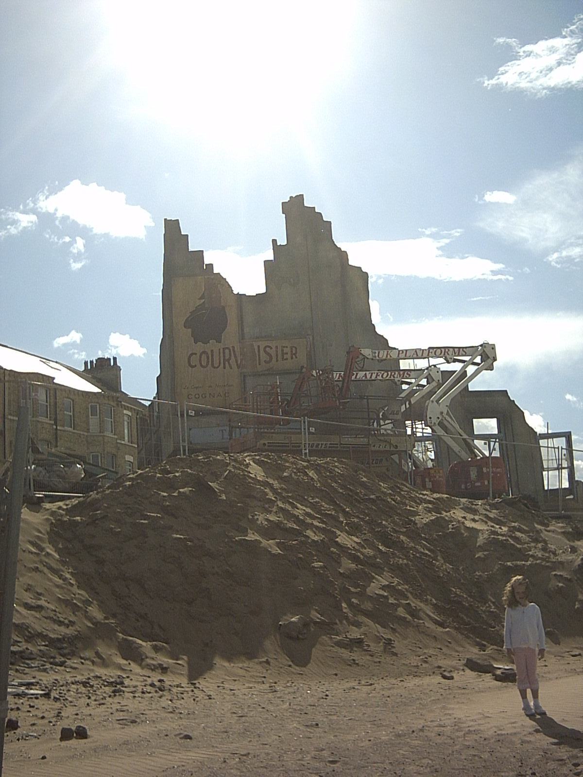 Film Set Redcar (August 2006)